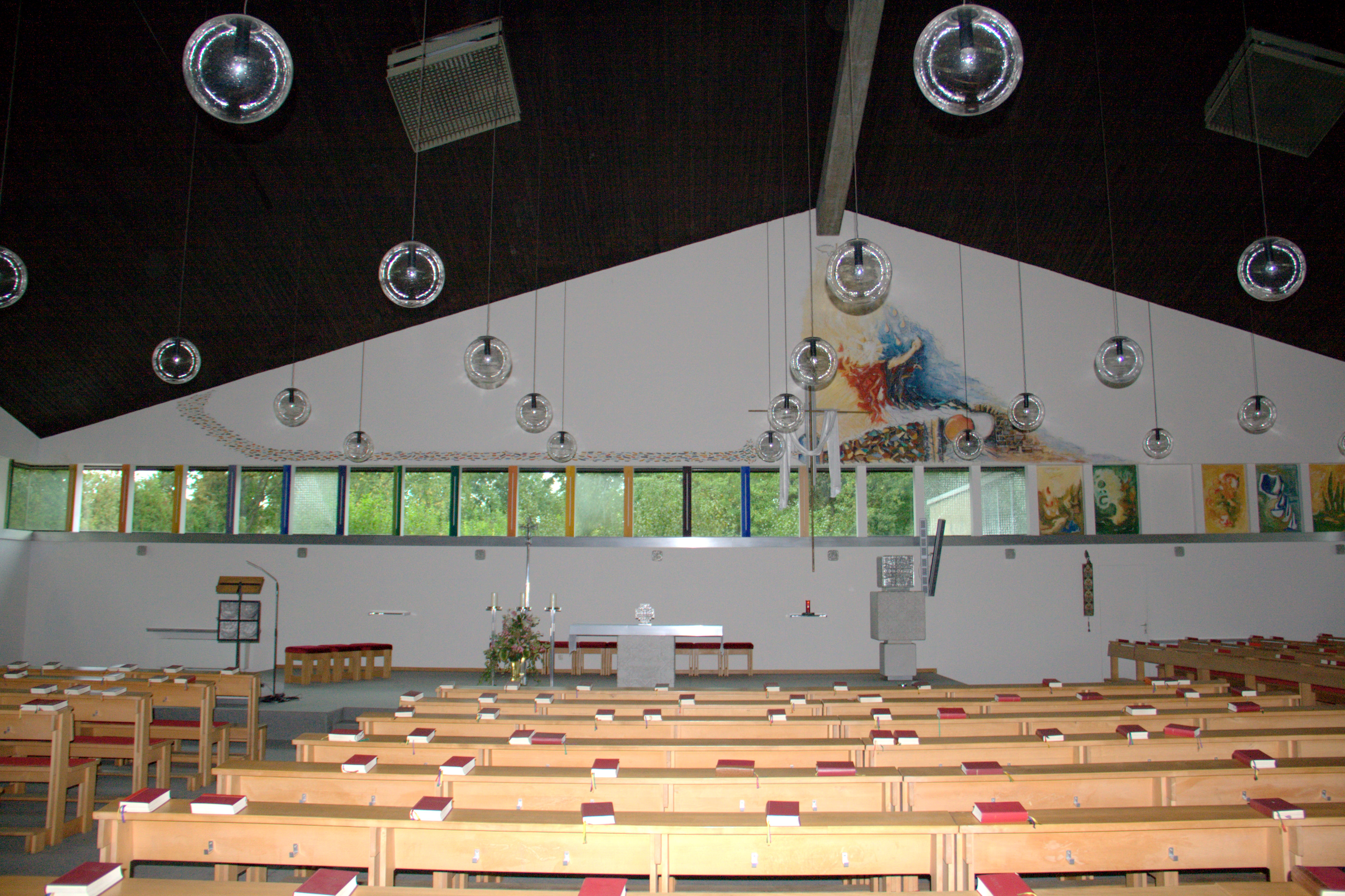 Kath. Pfarrkirche hl. Leopold, Innenansicht. Puntigam, Graz. Altäre, Altarkreuz, Tabernakel, Ambo, Taufbecken stammen von Fritz Hartlauer, 1971.